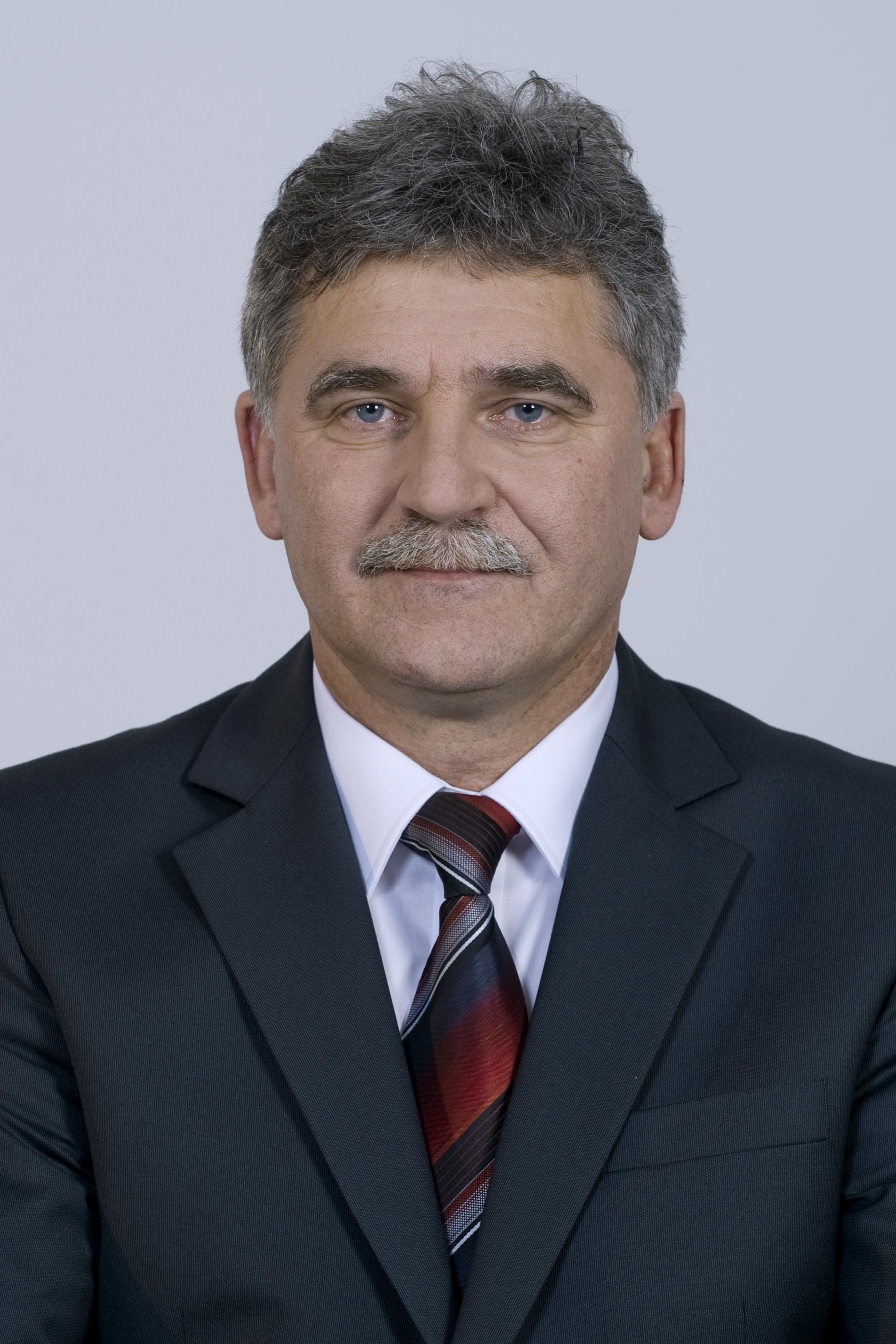 Roman Zaborowski